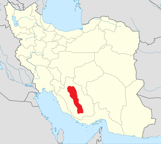 نقشه ی کوچ ایل باصری در نقشه ی ایران